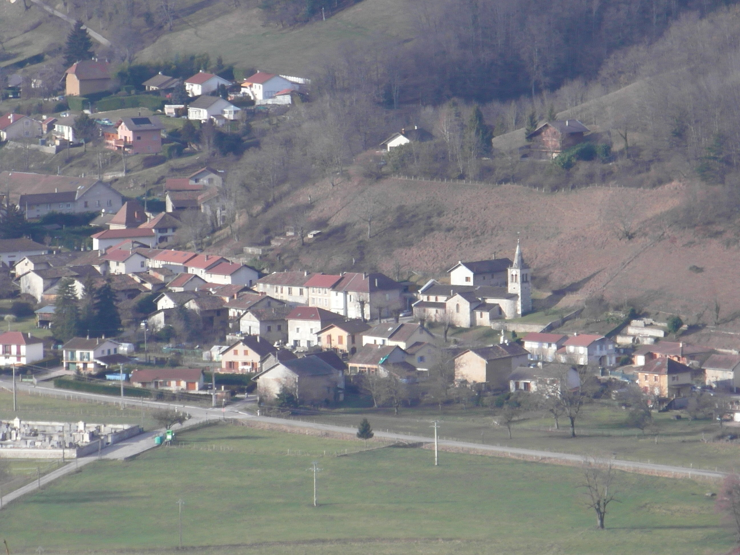 Massieu